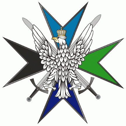 Dowództwo Generalne Rodzajów Sił Zbrojnych – odznaka pamiątkowa – Polska.